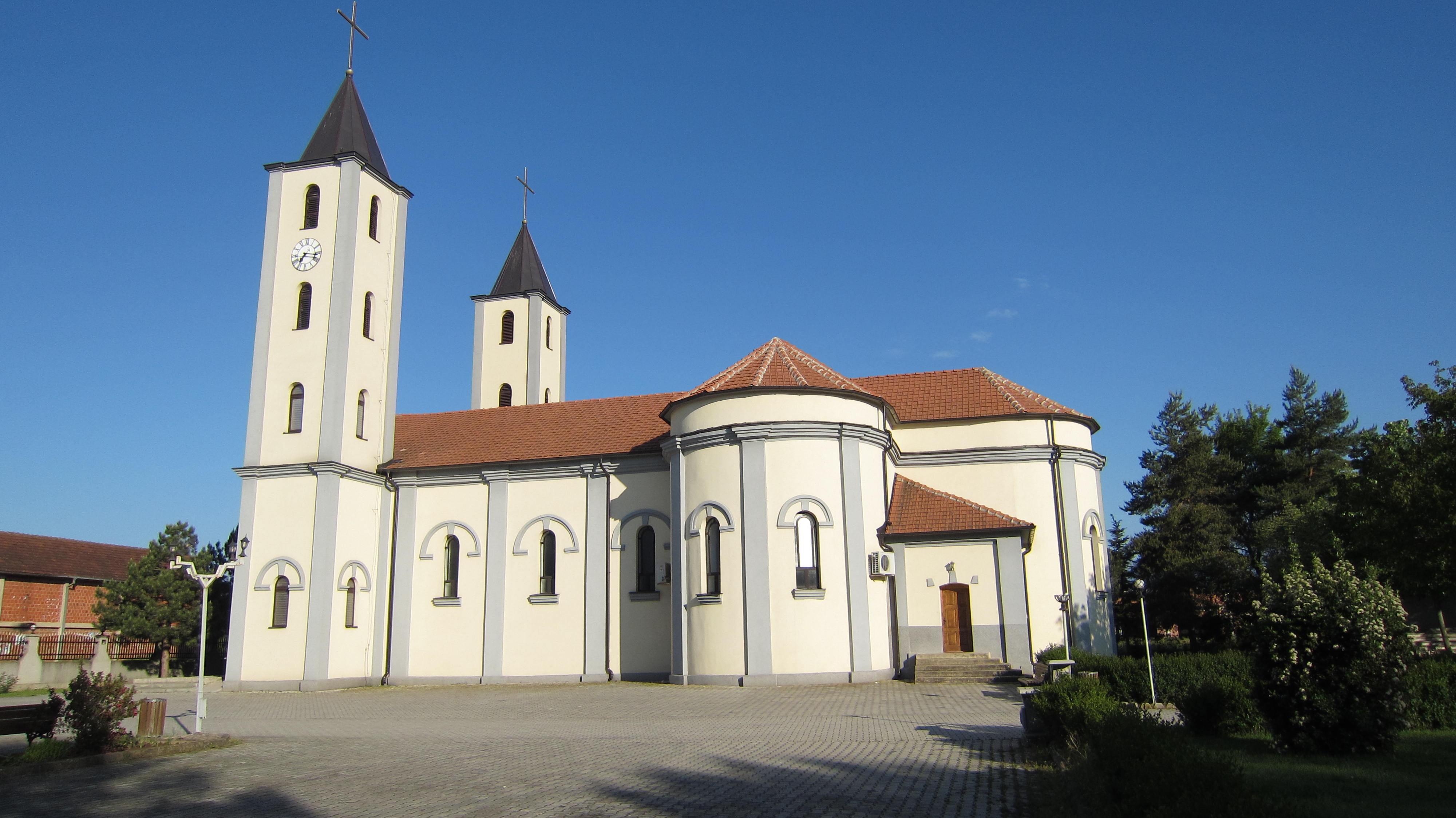 Kisha Katolike in Zllakuqan, dem "kleinen Rom" des Kosovo.